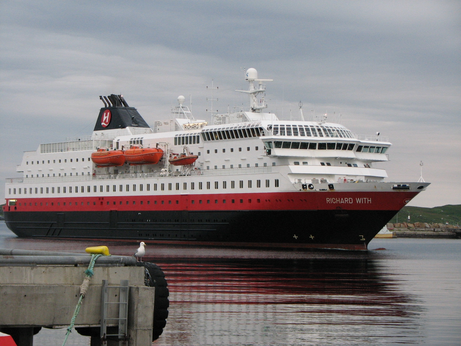 Richard With legger til kai i Vardø i juli 2008.